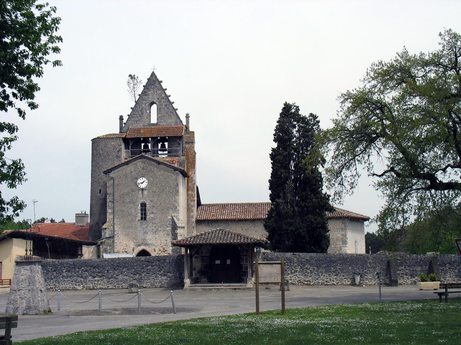 Pin sur le clocher de l'église de Pompogne (Lot-et-Garonne) Auteur : Monster1000 France mai 2006